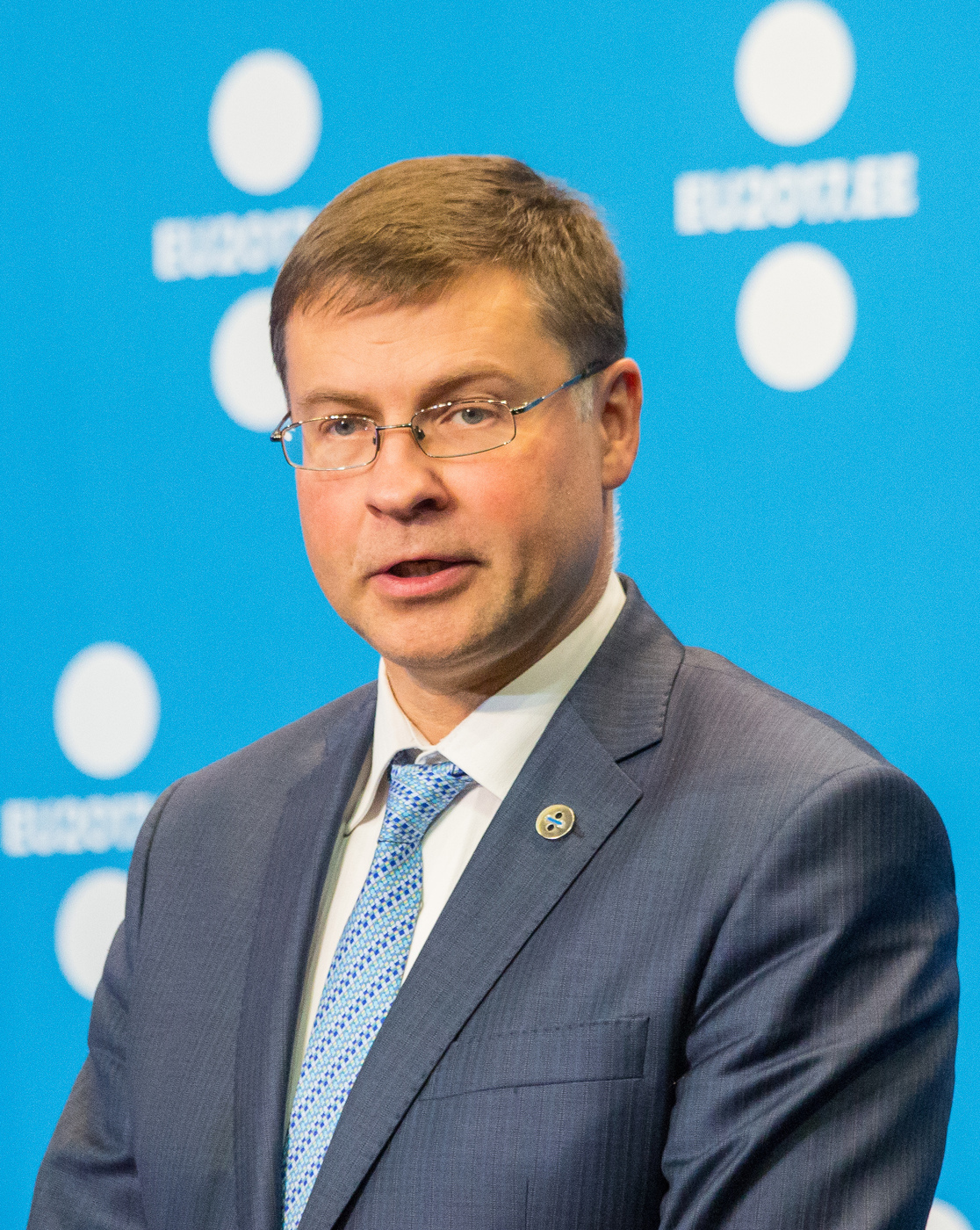 Portrait de Valdis Dombrovskis lors de l'ECOFIN informel du 16 septembre 2017.